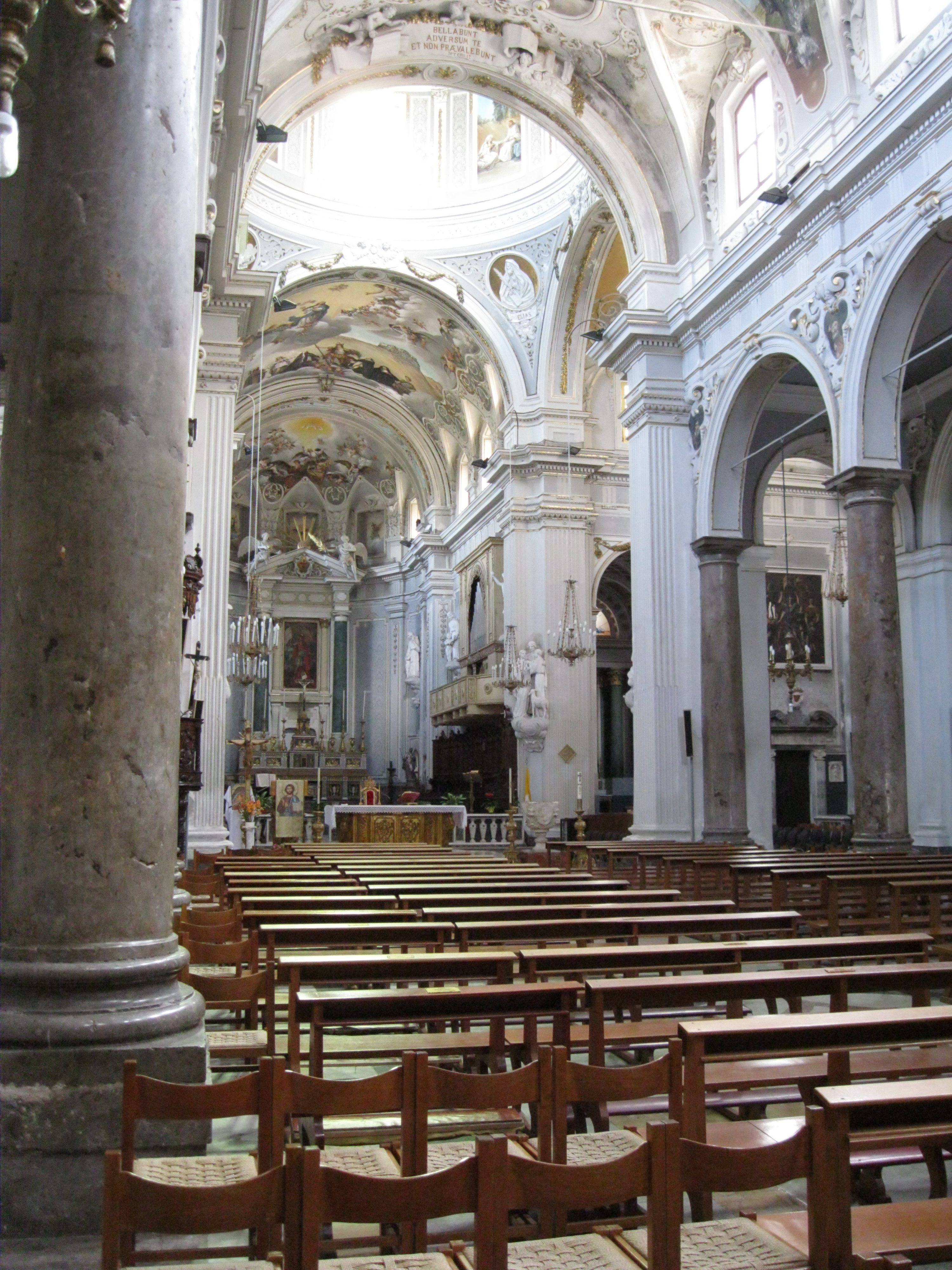 Il duomo di San Giorgio Martire a Caccamo, nella città metropolitana di Palermo.